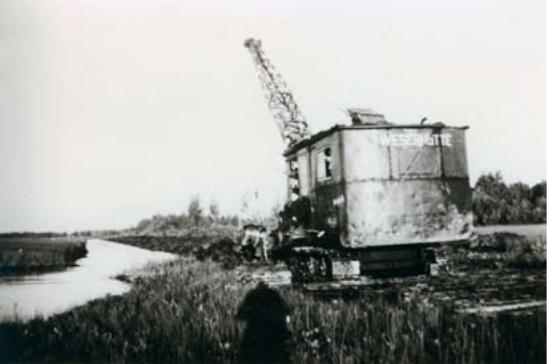 Limingan Kiiskilänjärven kuivatusta vuonna 1961. Kuvassa kaivinkone kaivaa kanavaa.